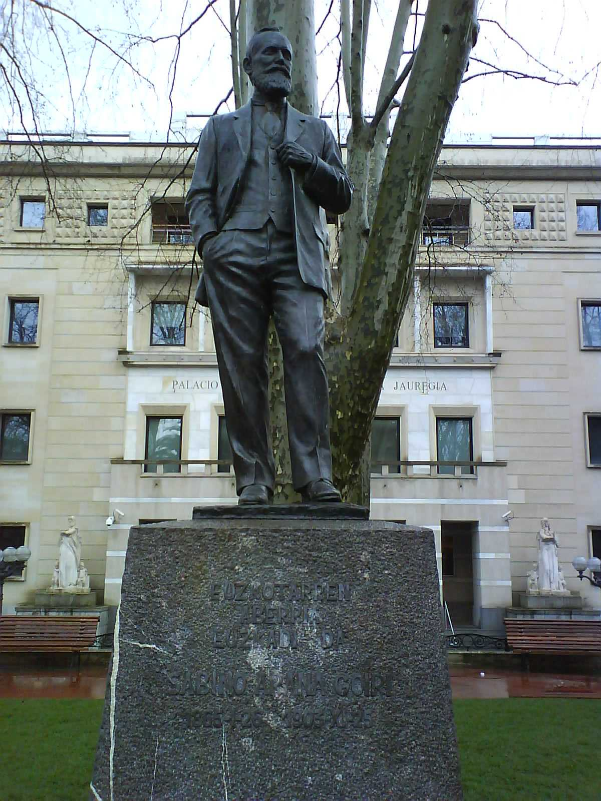 Estatua de Sabino Arana en Jardines Albia en Bilbao (Vizcaya)